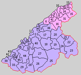 島根県那賀郡の町村制時点の町村。